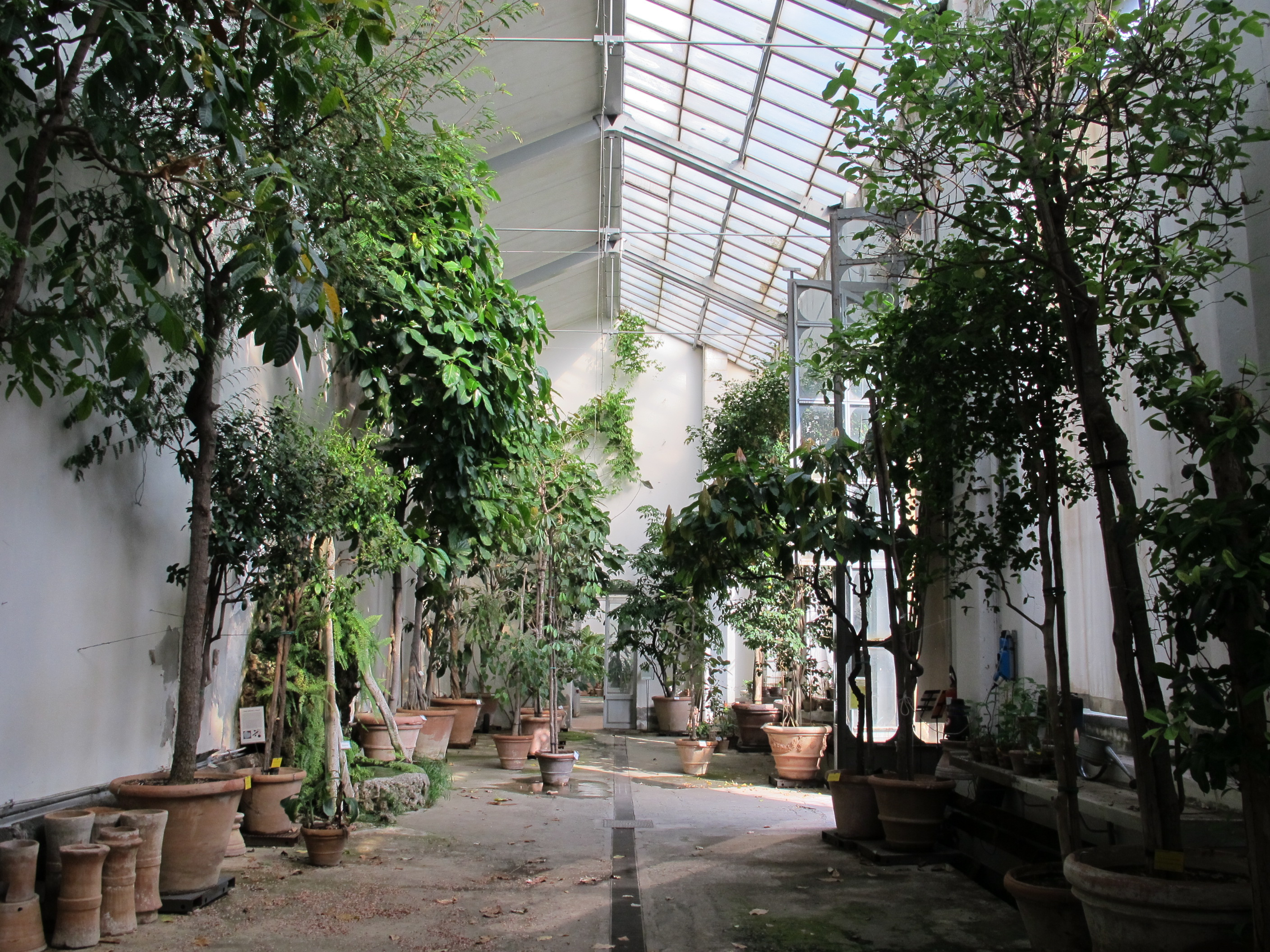 Giardino dei semplici, serra